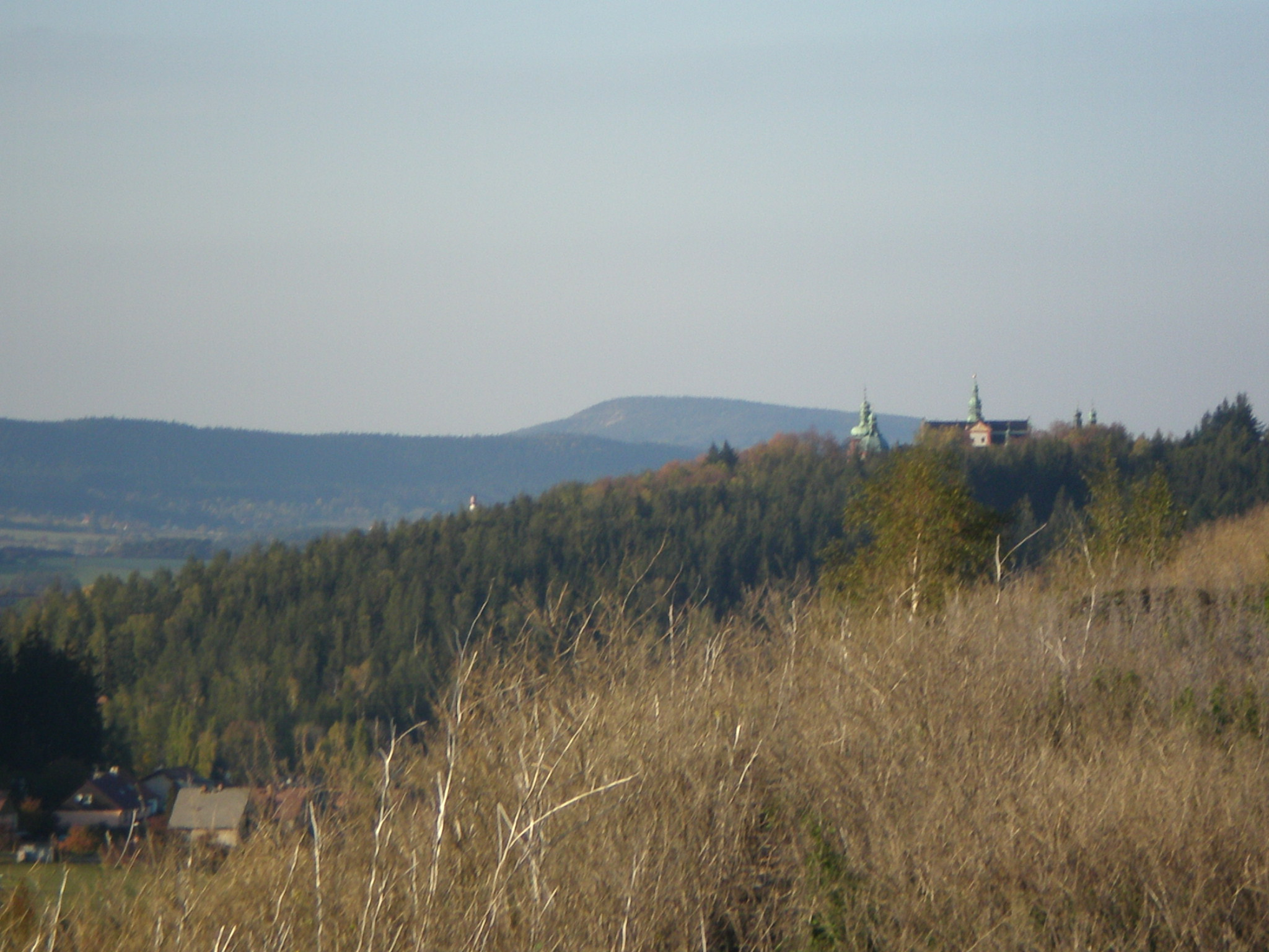 Svatá Hora nad Příbramí, v pozadí Plešivec (654 m)